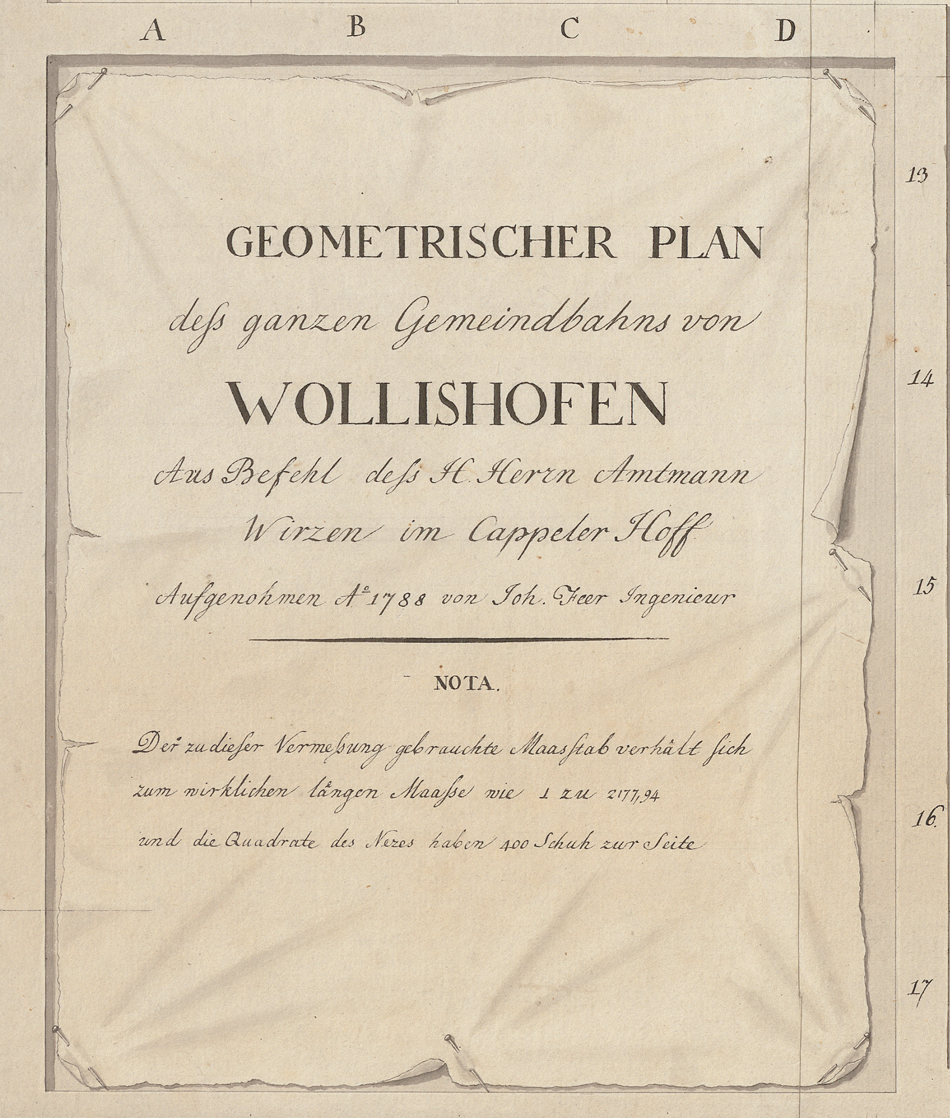 Geometrischer Plan deß ganzen Gemeindbahns von Wollishofen: Plan Wollishofens 1788, Titel